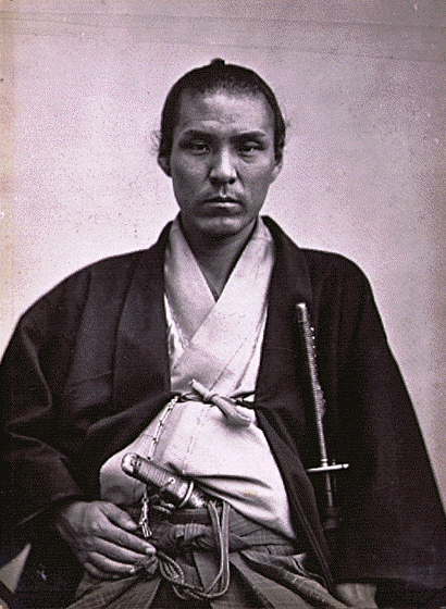 19 - 20世紀（江戸 - 大正時代）の人物・田辺太一の肖像写真（1863年・パリにて撮影）